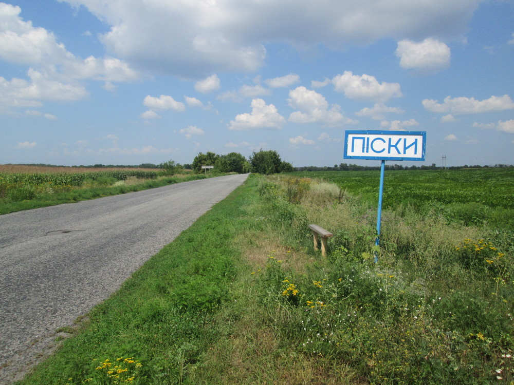 Автошлях Т 1721. На в'їзді у село Піски (Козельщинський район, Полтавська область) зі сходу з боку Козельщини